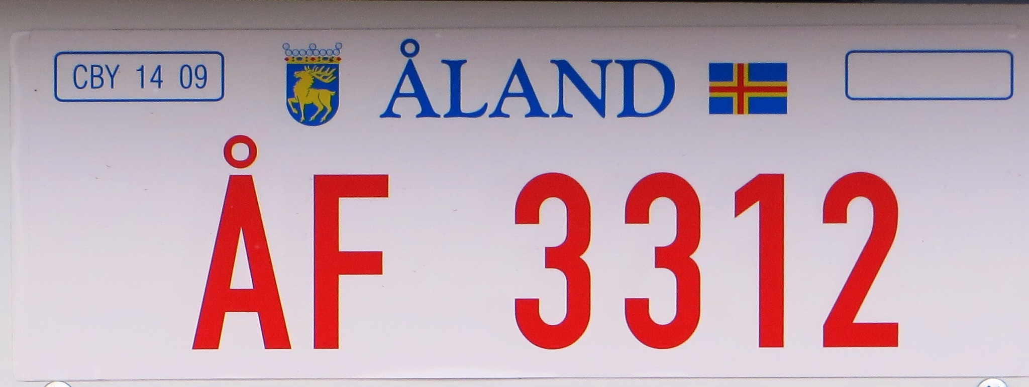 Åland tijdelijke kentekenplaat